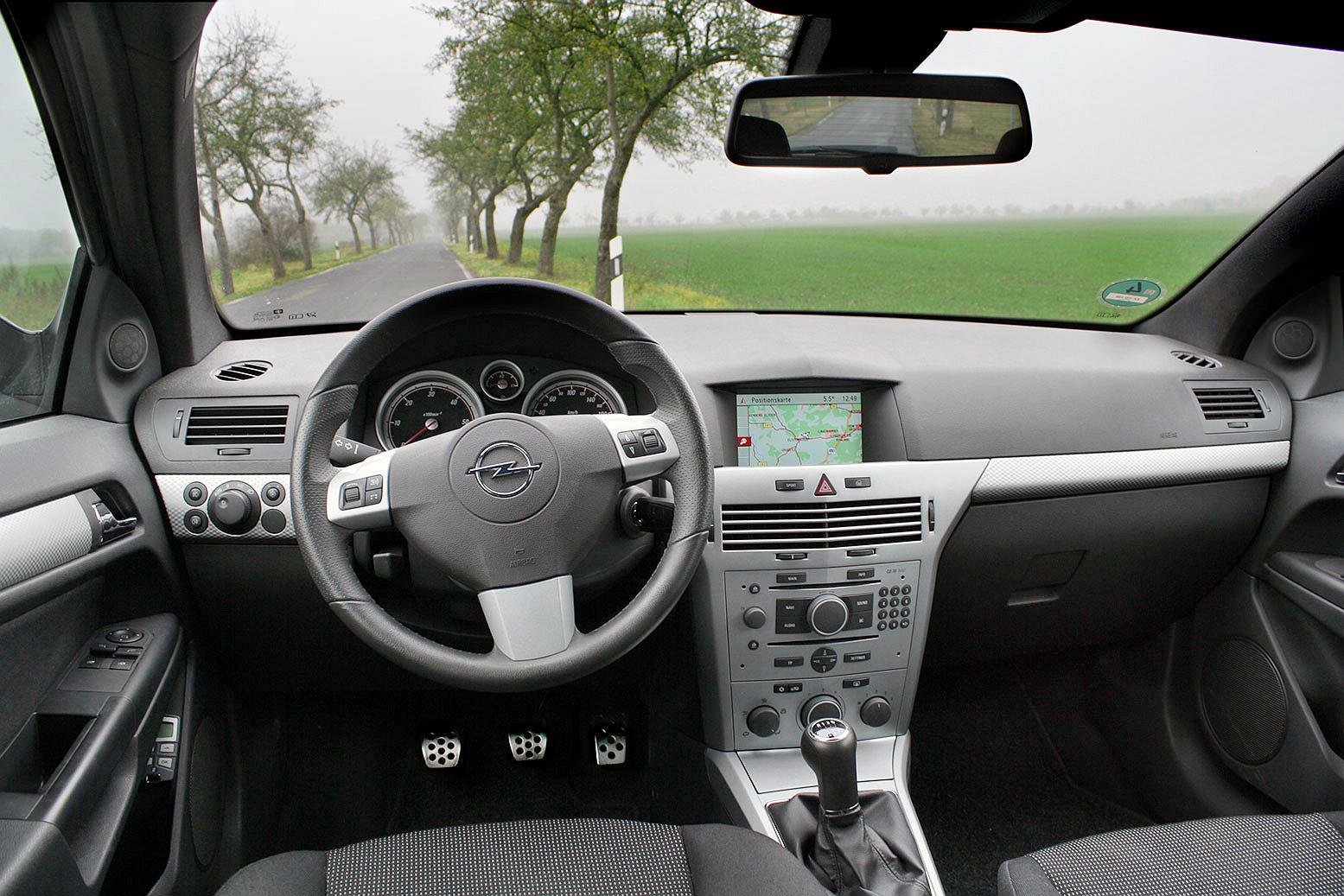 Innenraumfoto Opel Astra H